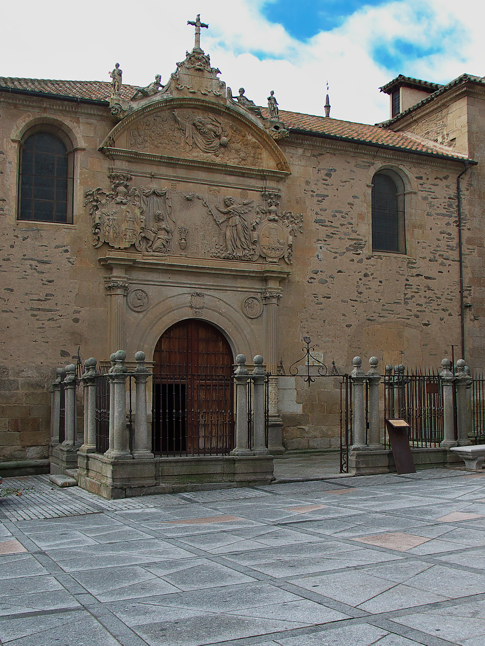 Portada conventual con un buen relieve de Juan de Montejo (ca. 1571) de la Anunciación.